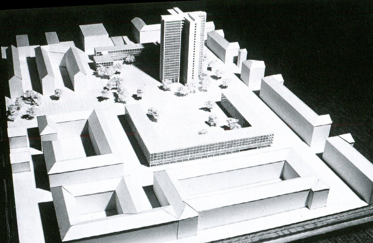 Modell på Skattskrapan